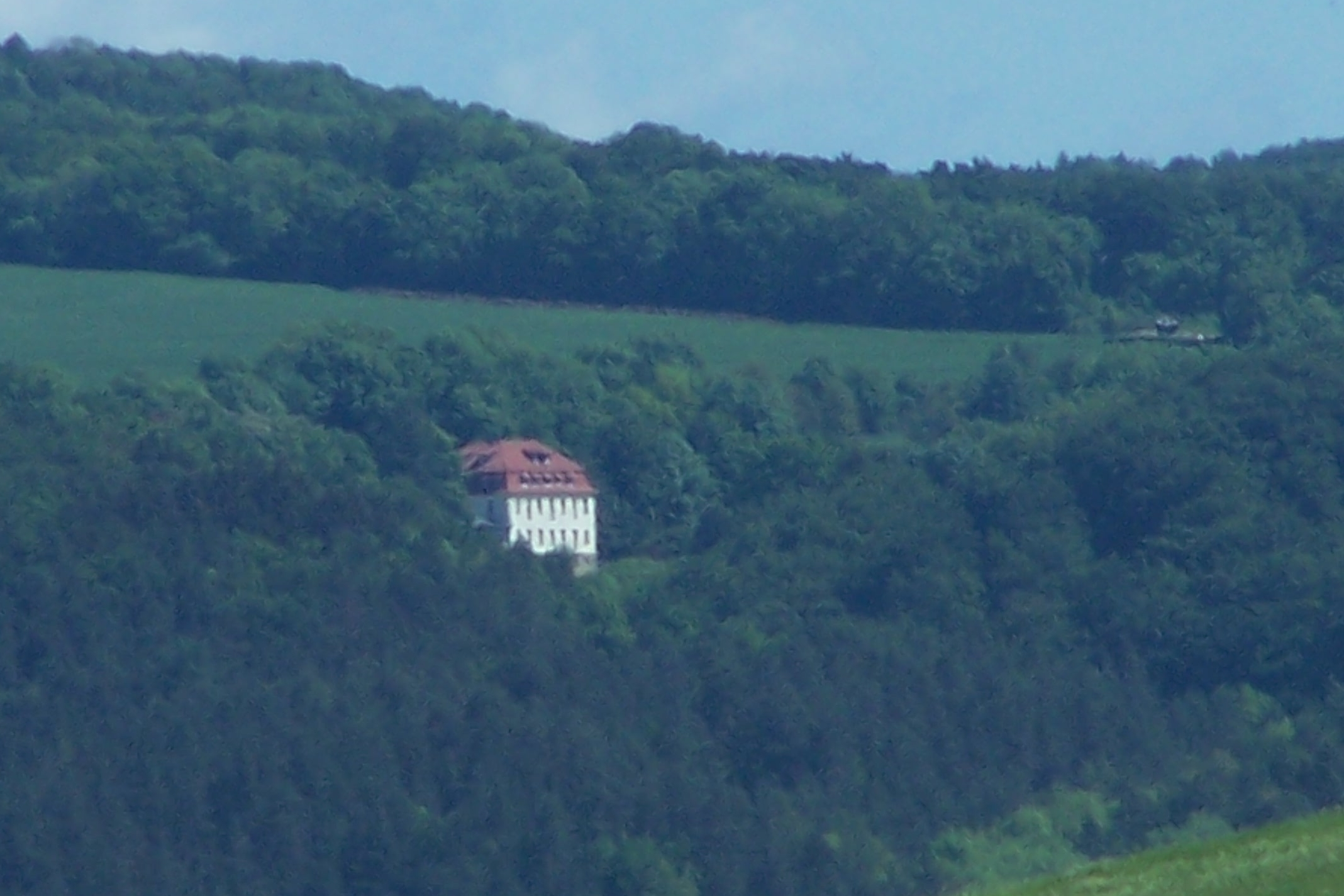 Das ehemalige Landschulheim Schönberg in Schierschwende, Unstrut-Hainich-Kreis.